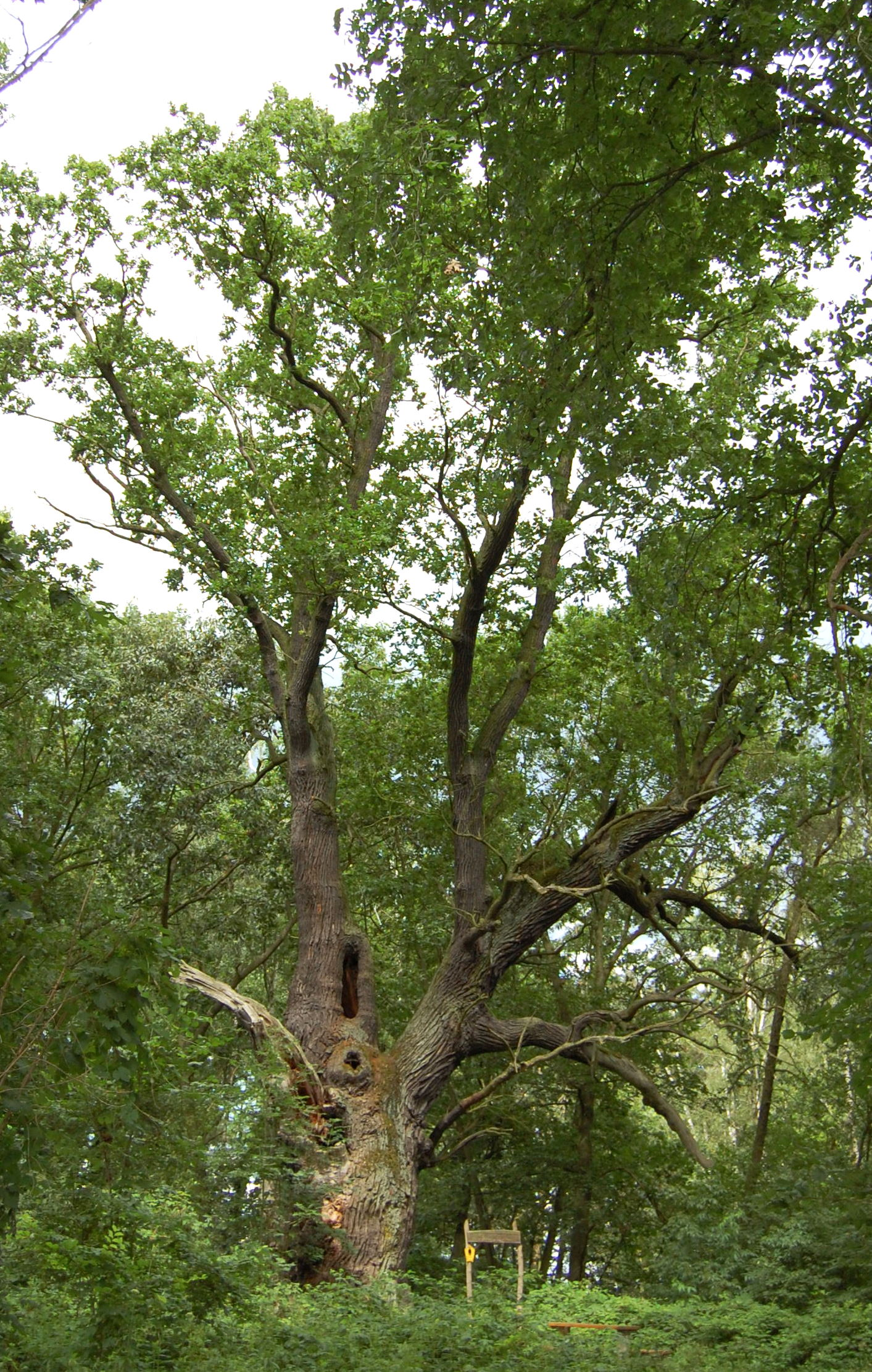 Kaiser-Wilhelm-Eiche bei Straupitz, Landkreis Dahme-Spreewald, Brandenburg, Deutschland.